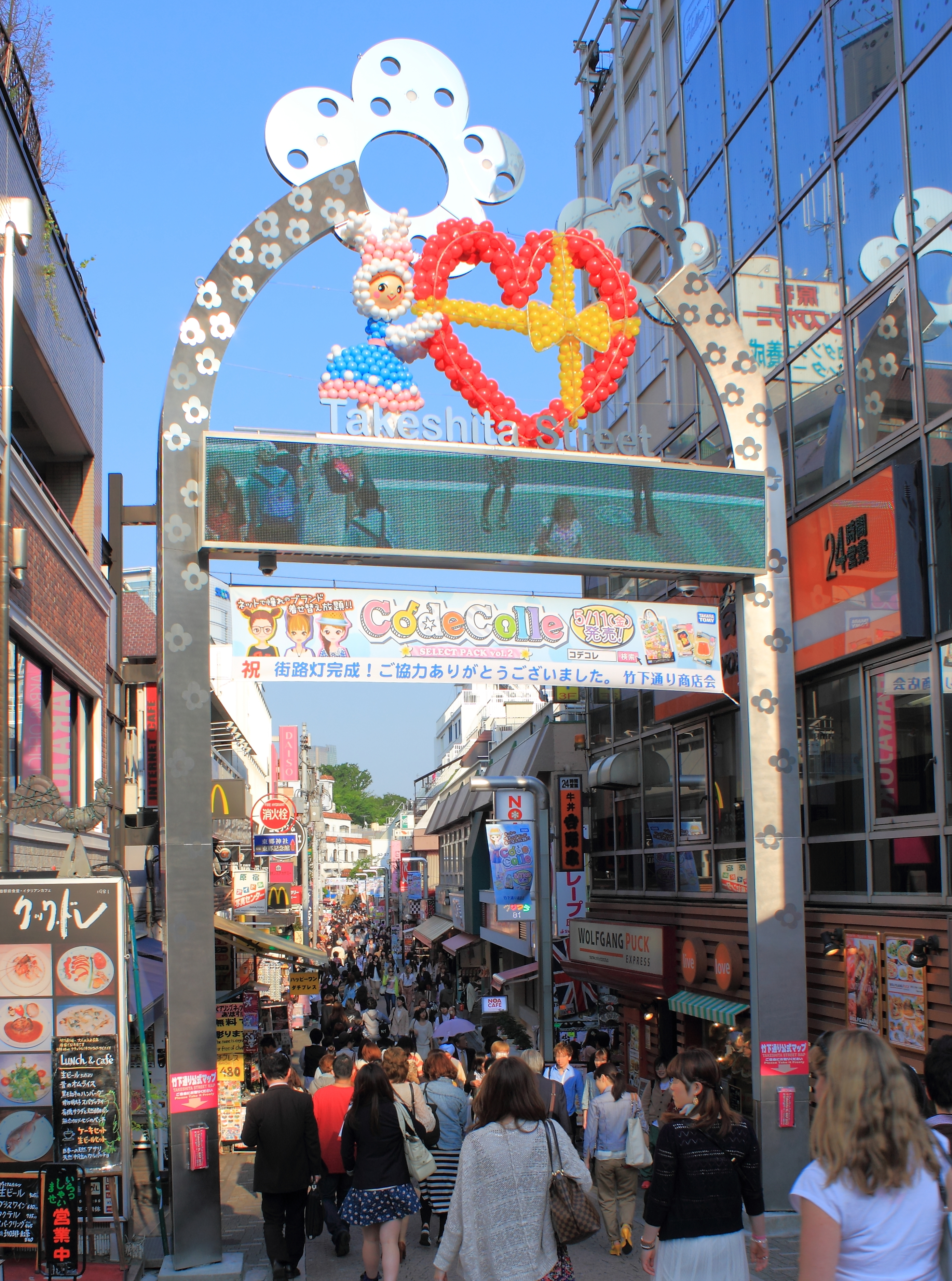 竹下通り（東京都渋谷区）